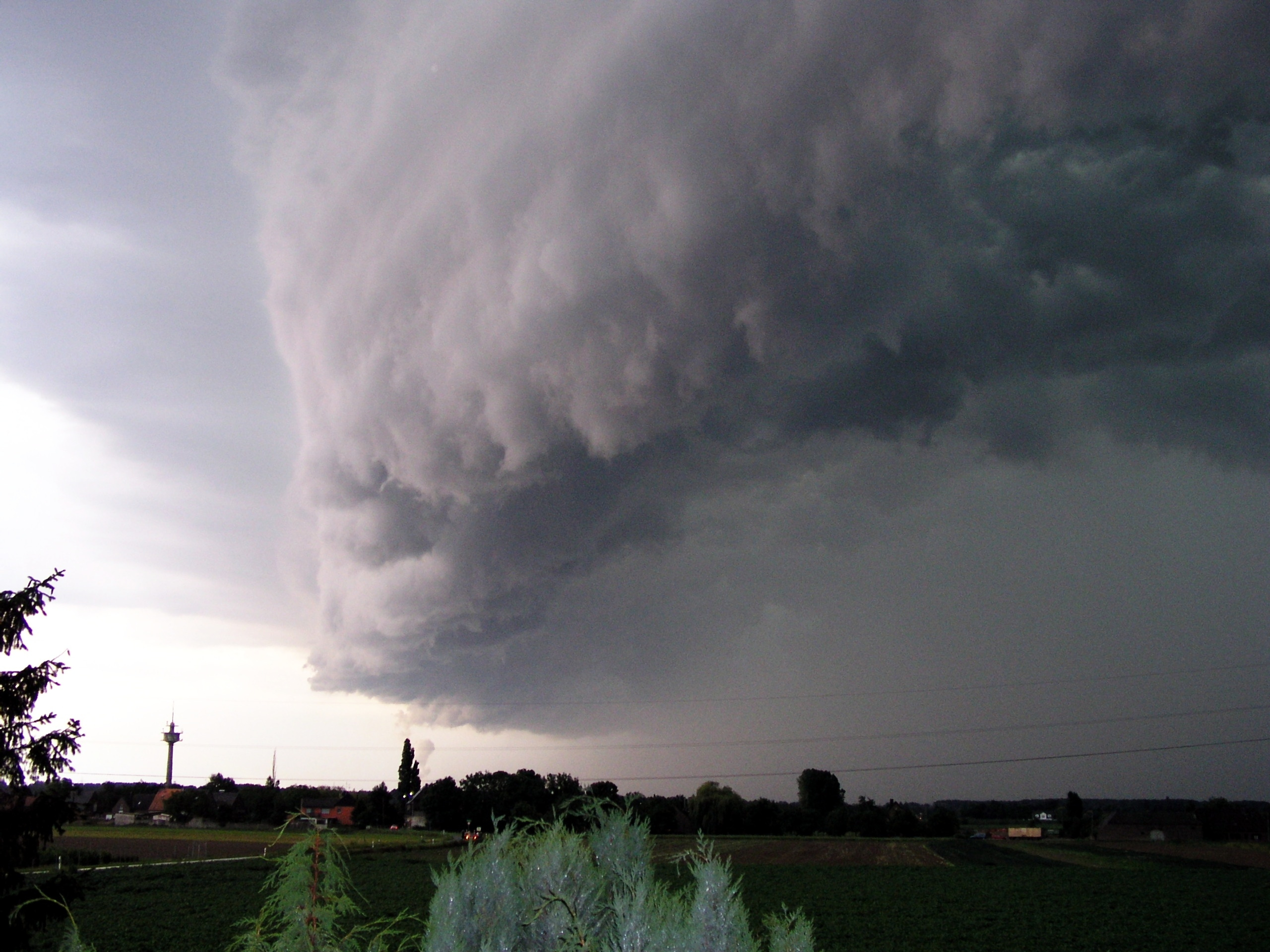 Gewitterfront